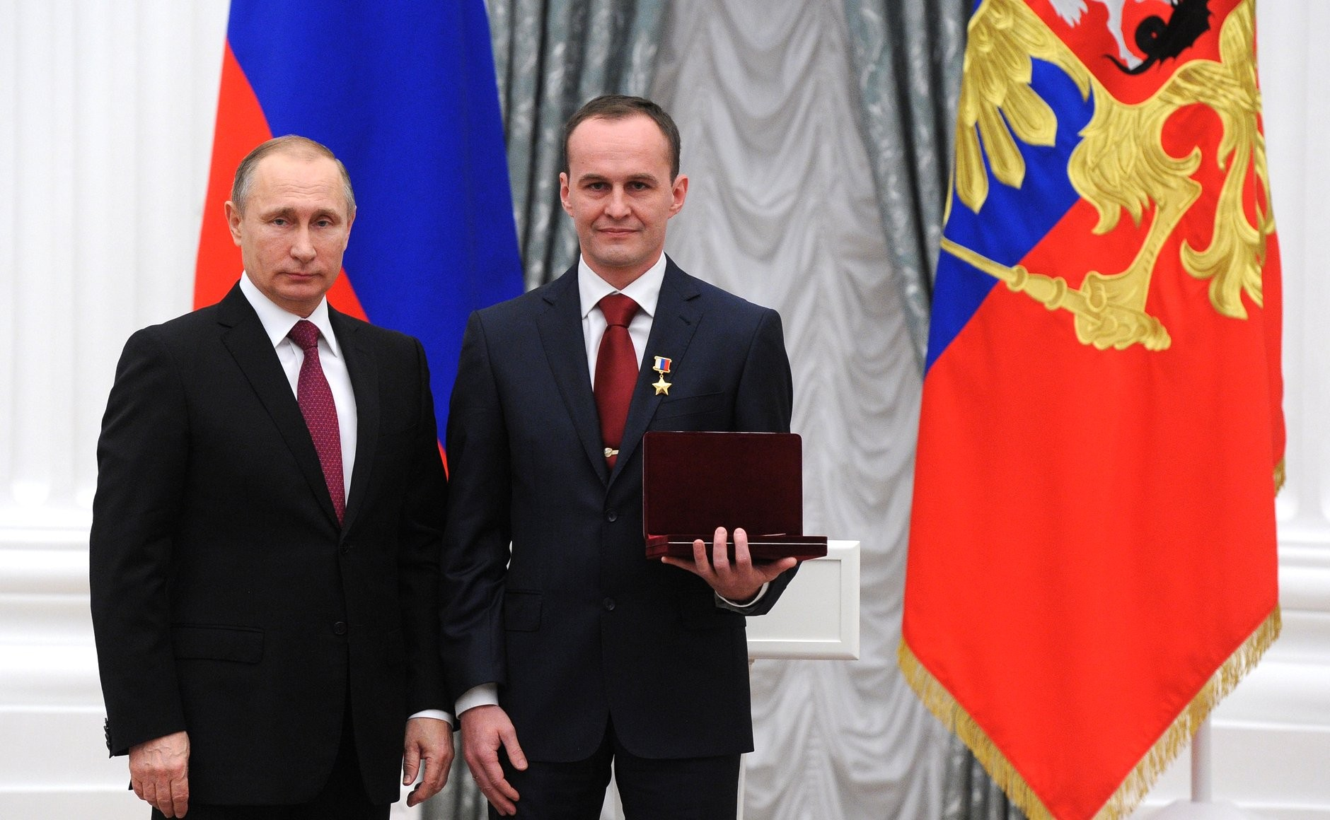 На церемонии вручения государственных наград Российской Федерации. Звание «Герой России» и почётное звание «Лётчик-космонавт России» присвоено космонавту-испытателю Сергею Рязанскому.